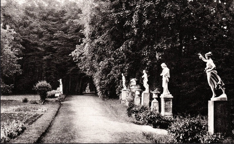 Дворец Кляйн Байнунен